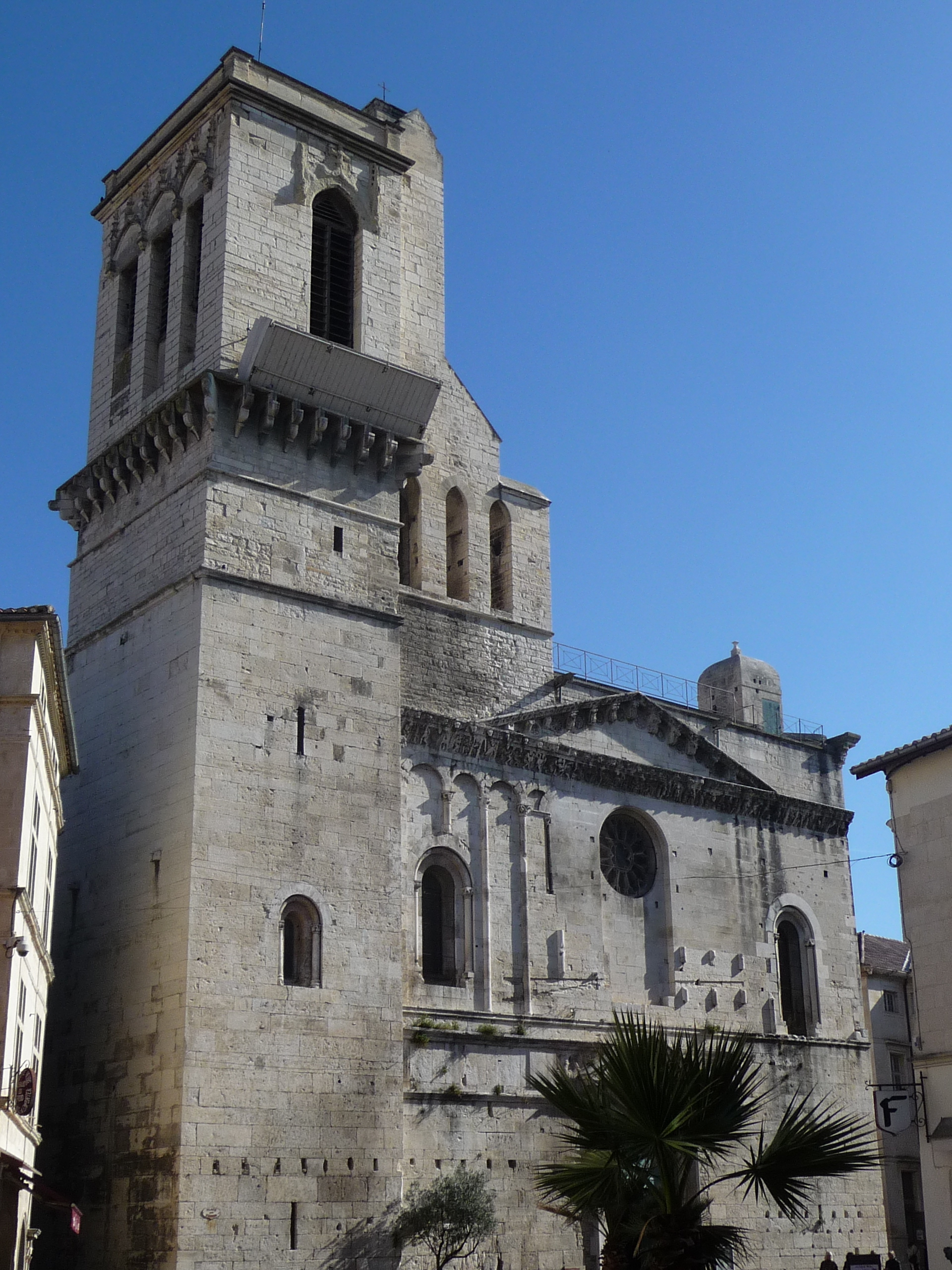 Vue de l'entrée principale de la cathédrale Notre-Dame-et-Saint-Castor de Nîmes (Gard, France) .